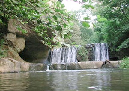 Le Cascate